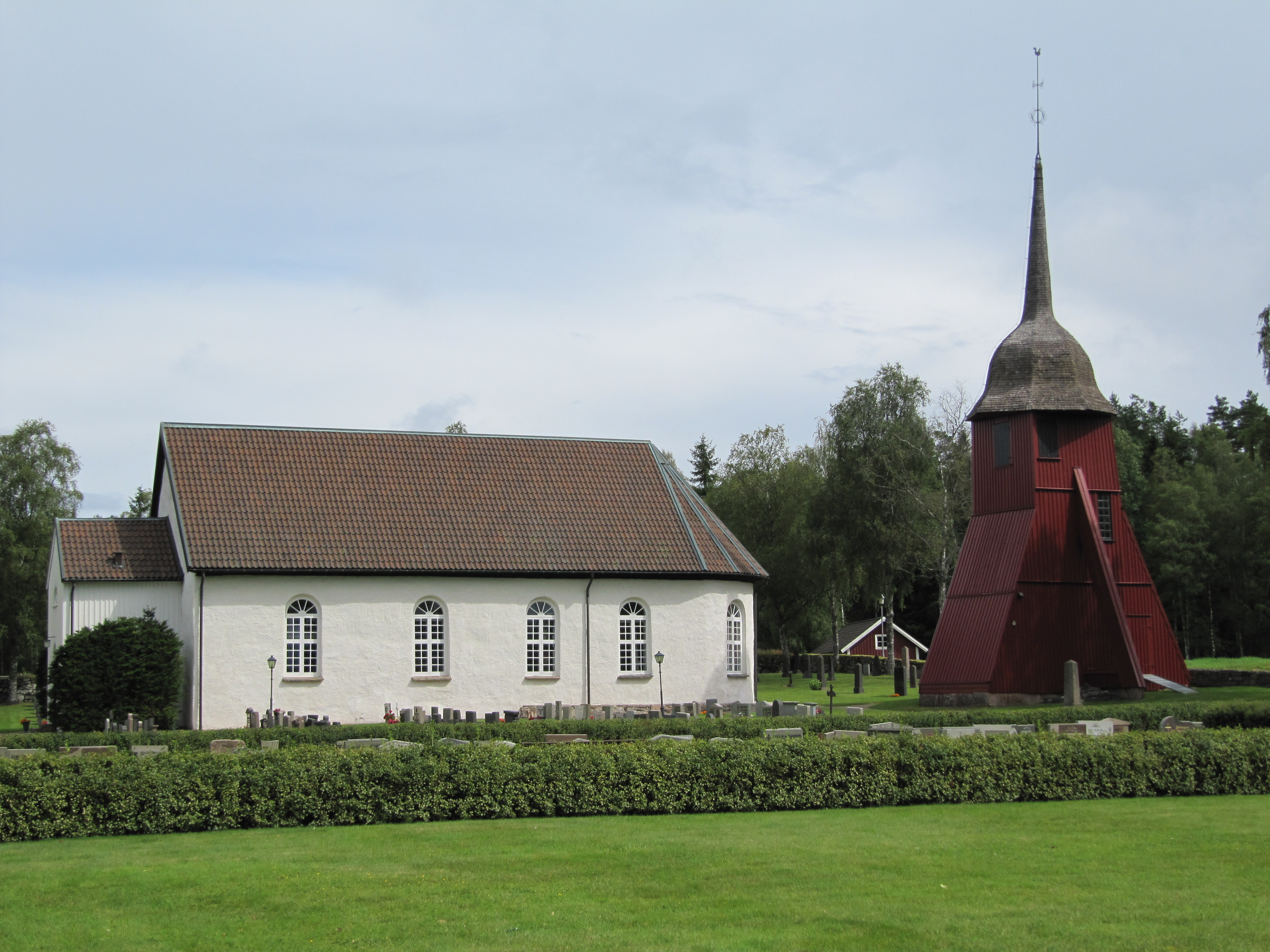 Ljungsarps kyrka med klockstapel